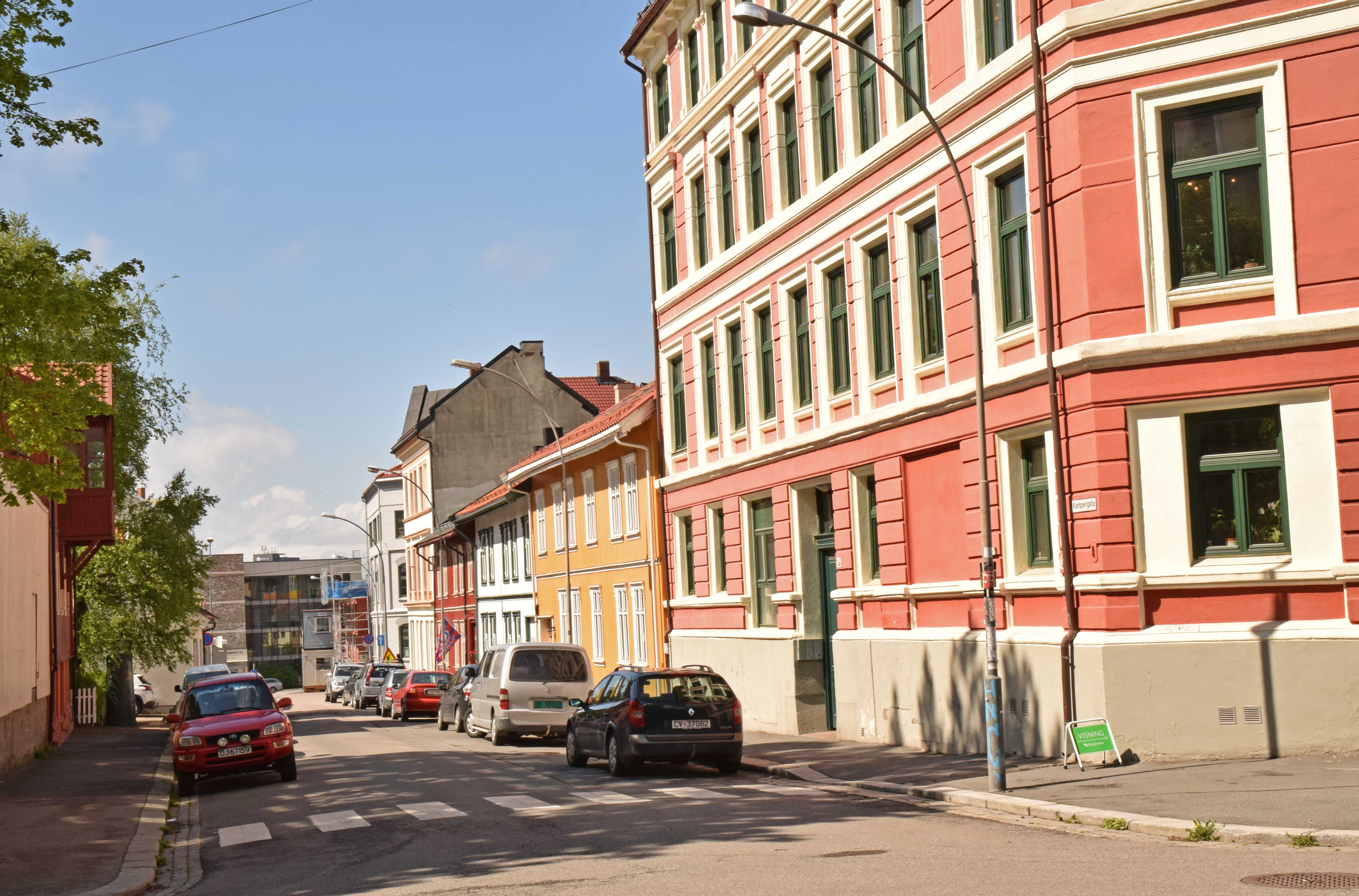 Blandet bebyggelse på Kampen. Trehusene er Kampengata 22, 24 og 26 murgården nærmest Normannsgata 28